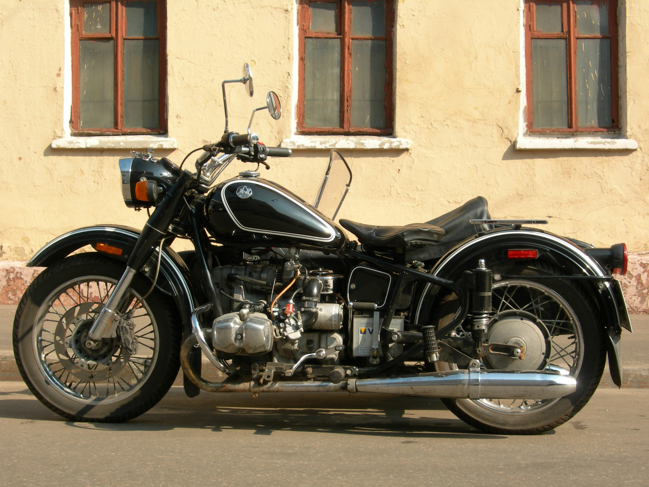 Мотоцикл с коляской УРАЛ РЕТРО, 2004